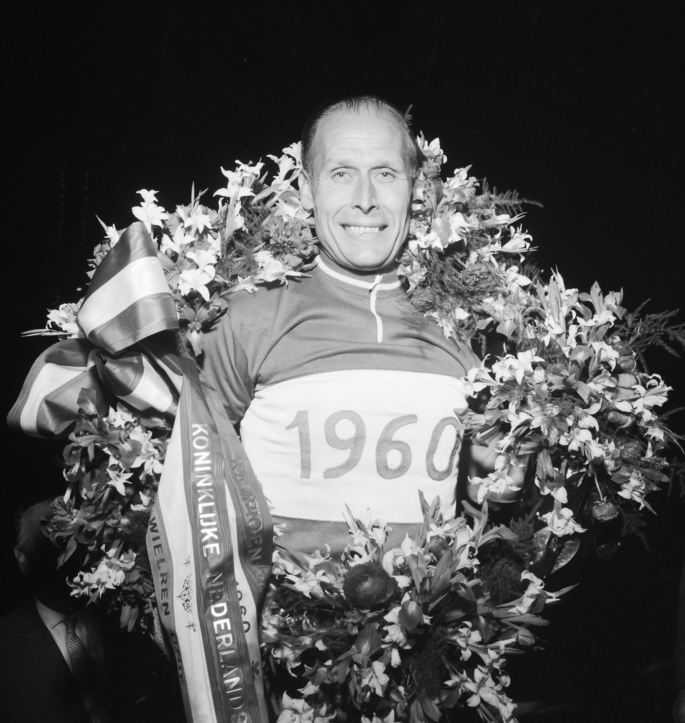 Jan Derksen Nederlandse sprintkampioen voor de elfde maal. Jan Derksen met zijn krans